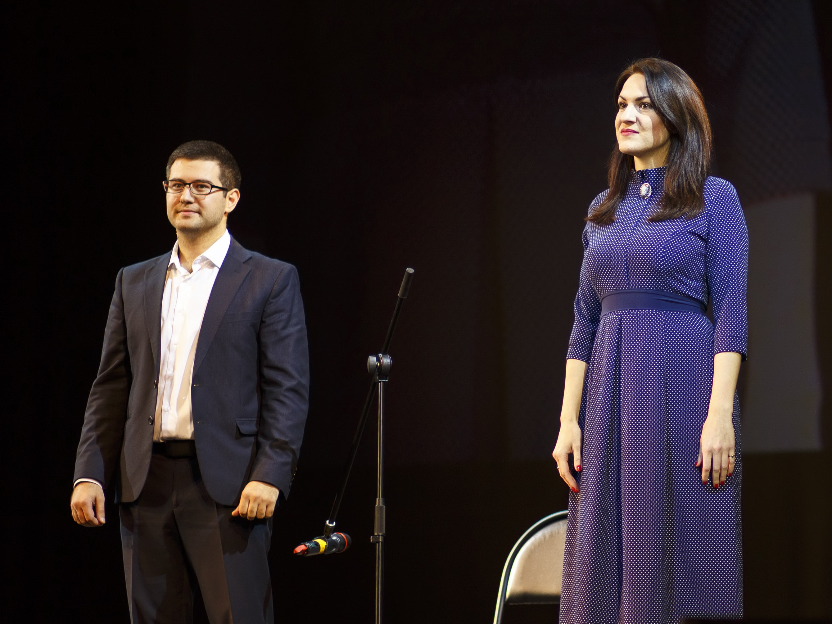 Սուրեն Բաղդասարյանը և Մարինա Սելիվանովան Դուդուկի մոսկովյան միջազգային 3-րդ փառատոնին, 2016 թվականի սեպտեմբերի 25, Մոսկվա